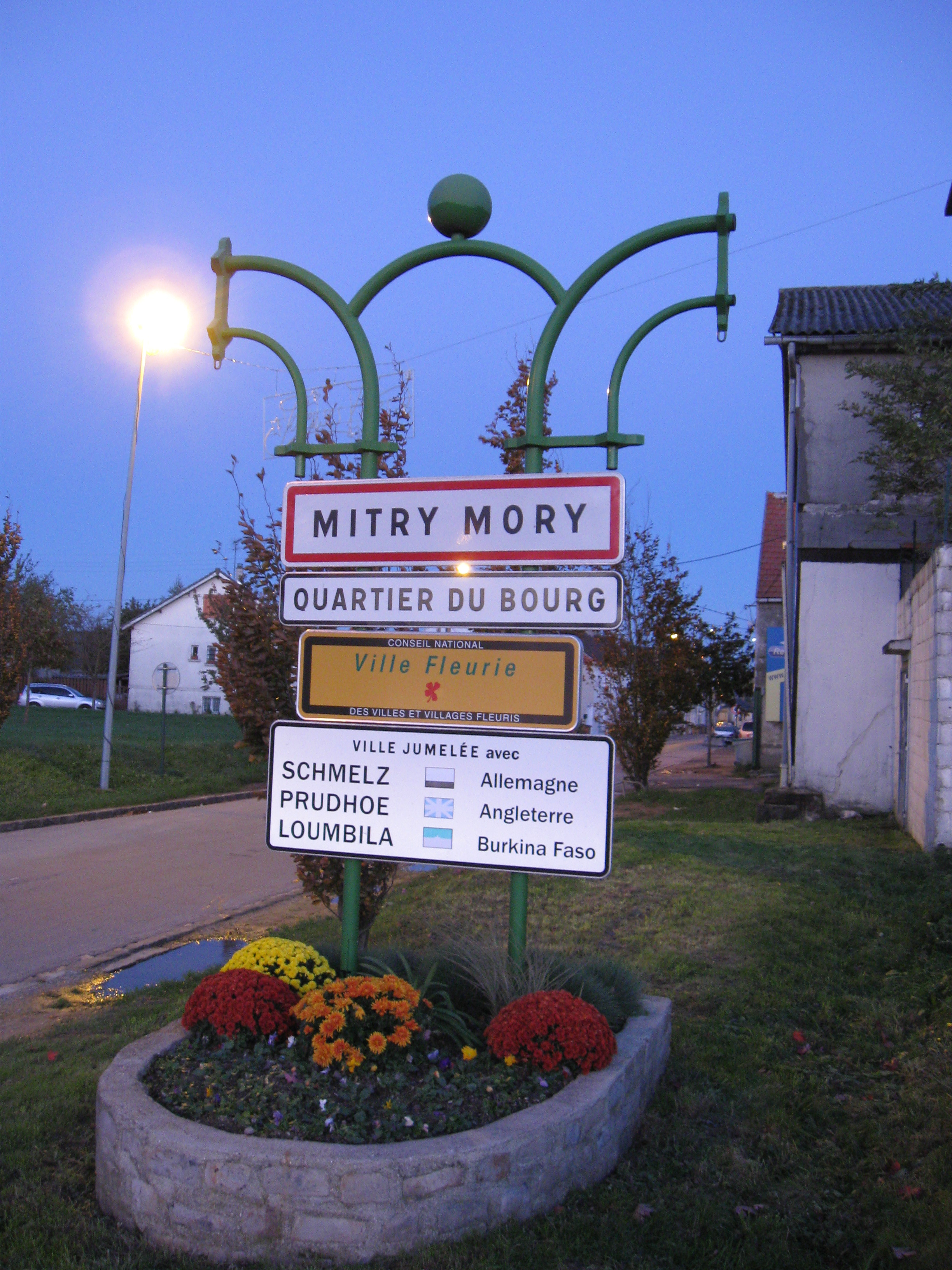 Panneau à l'entrée de Mitry-Mory, quartier du Bourg. (département de la Seine-et-Marne, région Île-de-France).